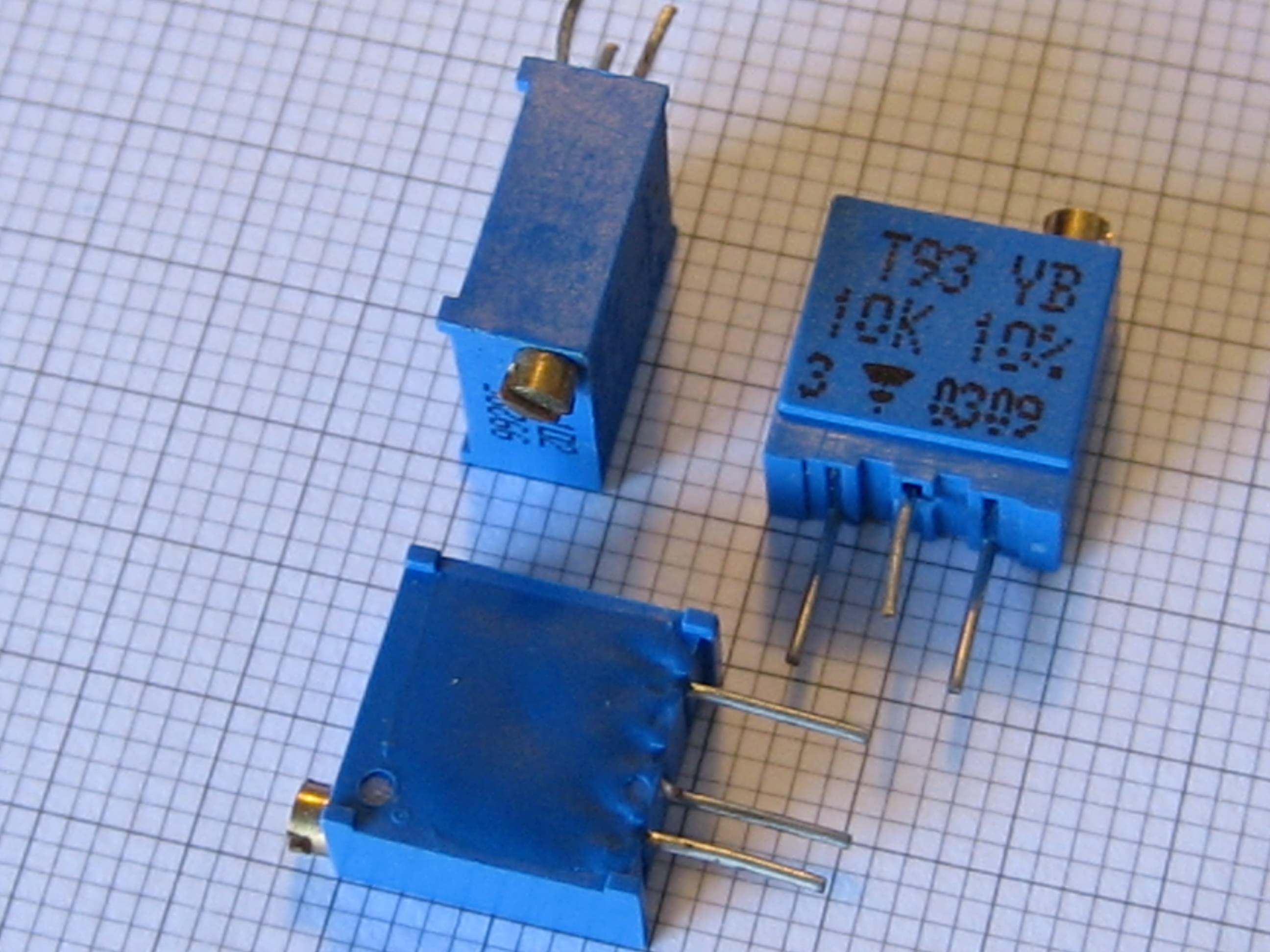 Potenciómetros "de precisión" sobre papel milimetrado.